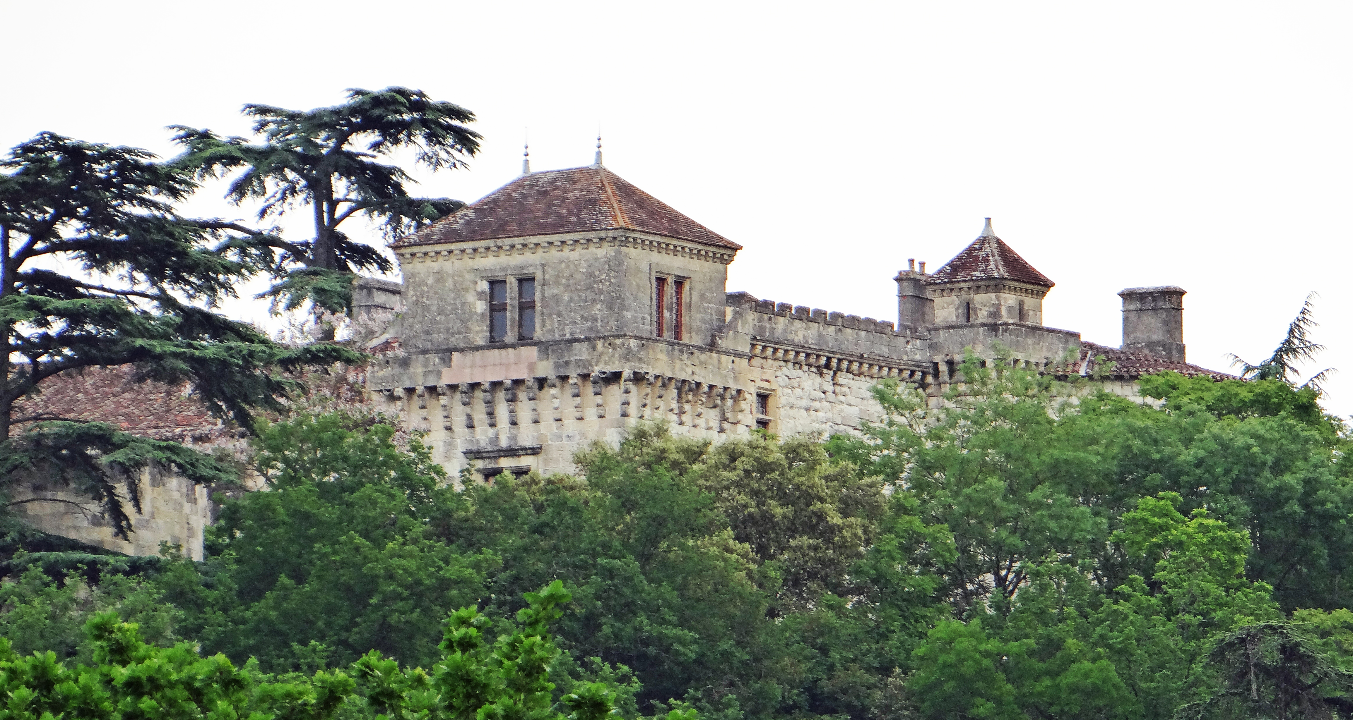 Bon-Encontre - Château de Castelnoubel vu du côté ouest